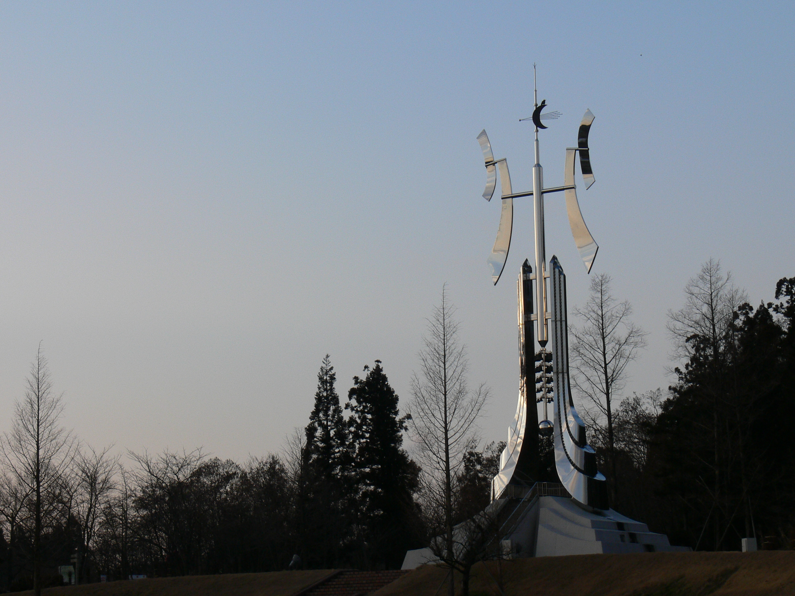 カリオンパーク